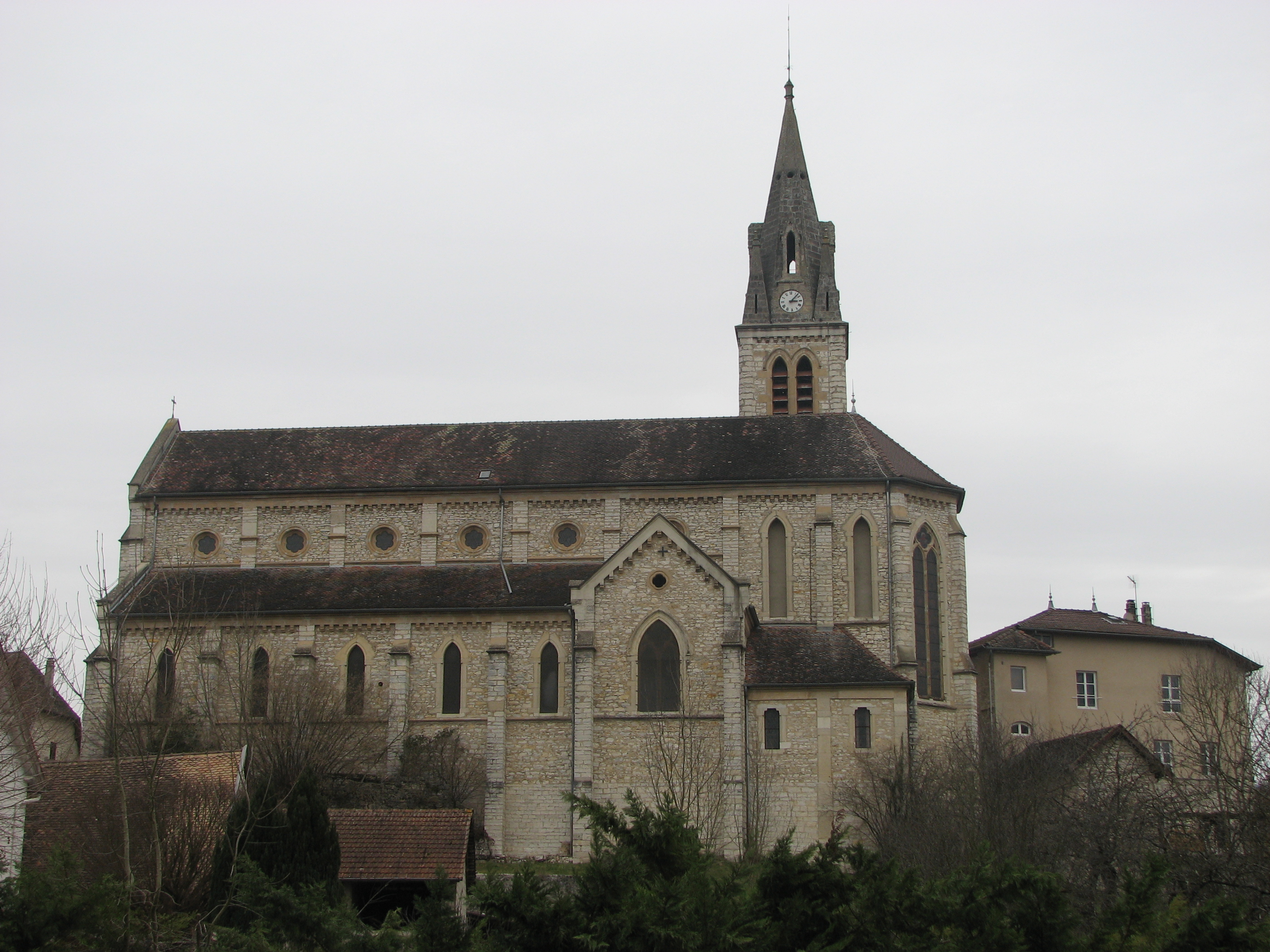 Église de Crey (38)